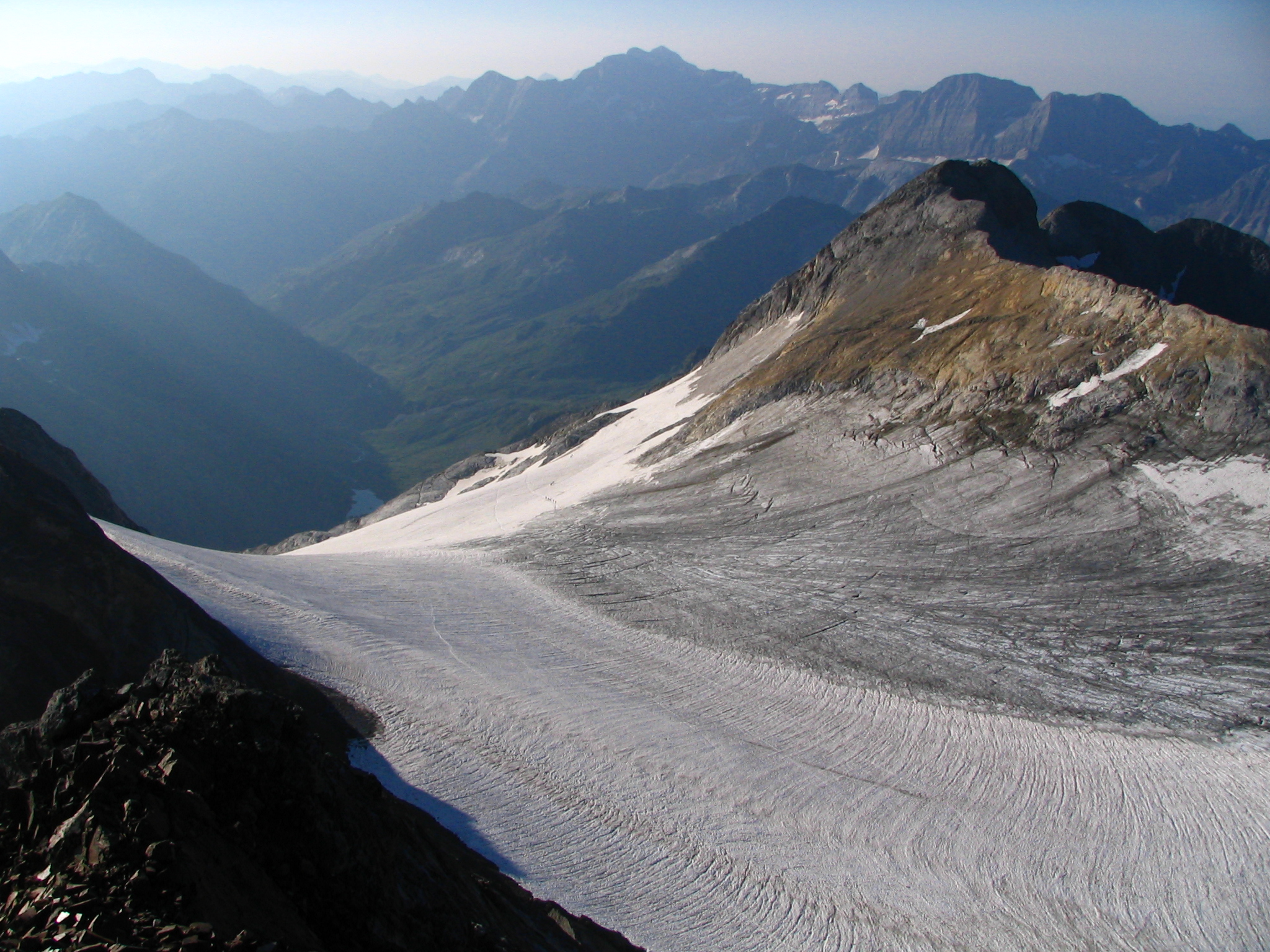 Pic du Montferrat (au premier plan, sur la droite), vu du sommet du Vignemale